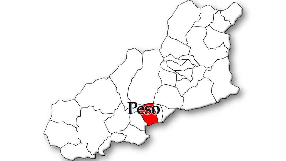 População